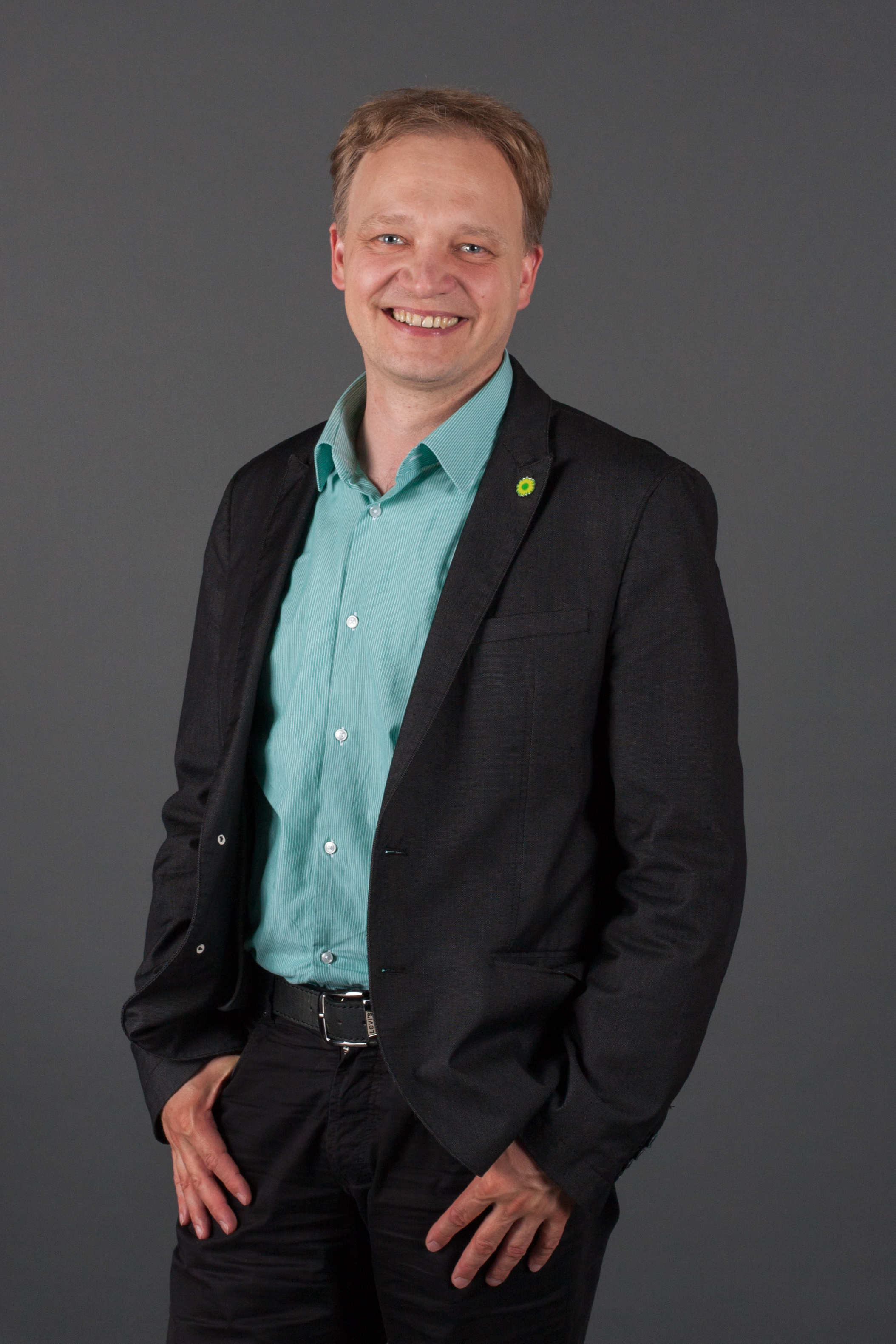 Johann-Georg Jaeger, MdL Mecklenburg-Vorpommern, Fraktion Bündnis 90/Die Grünen